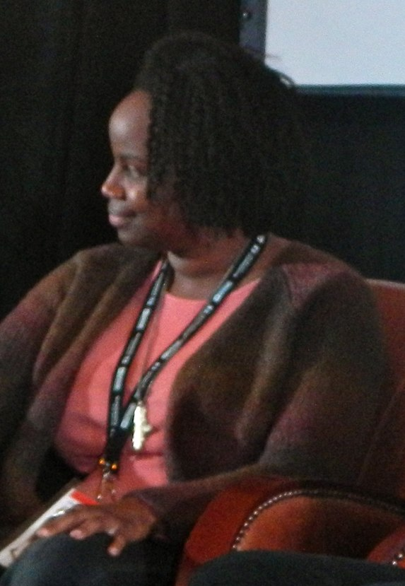 Sundance Times Talk